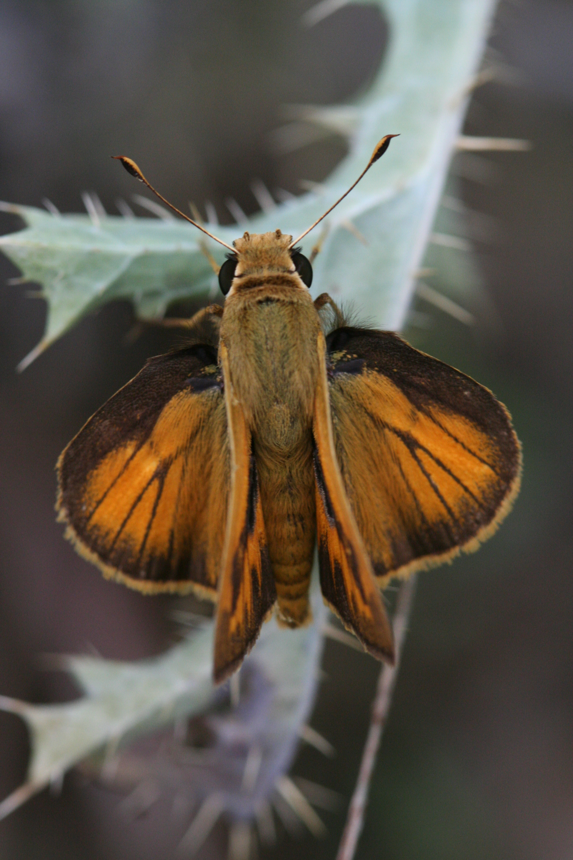 Polites vibex (male)